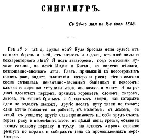 Журнал "Отечественные записки", 1856, № 3. Очерк И. А. Гончарова "Сингапур"